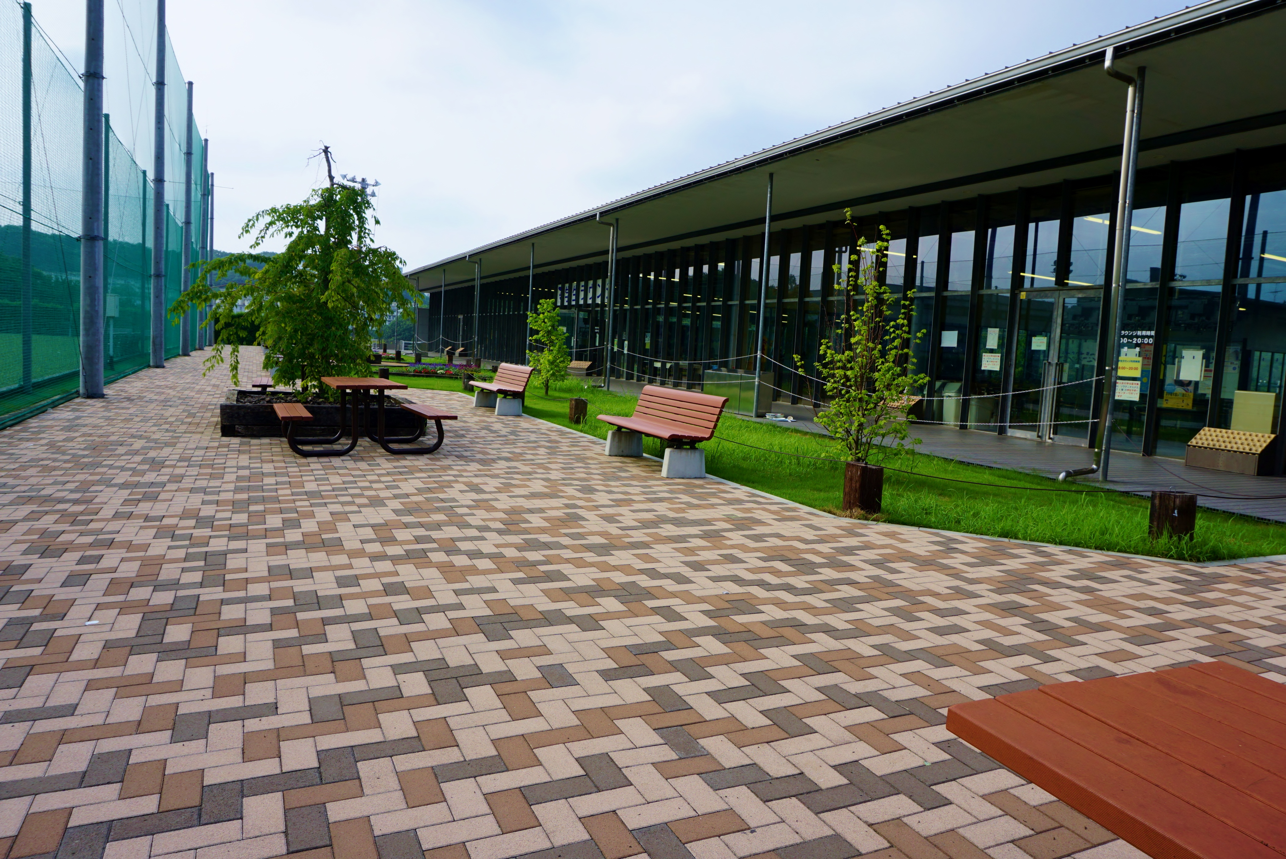 学生ラウンジと前の広場